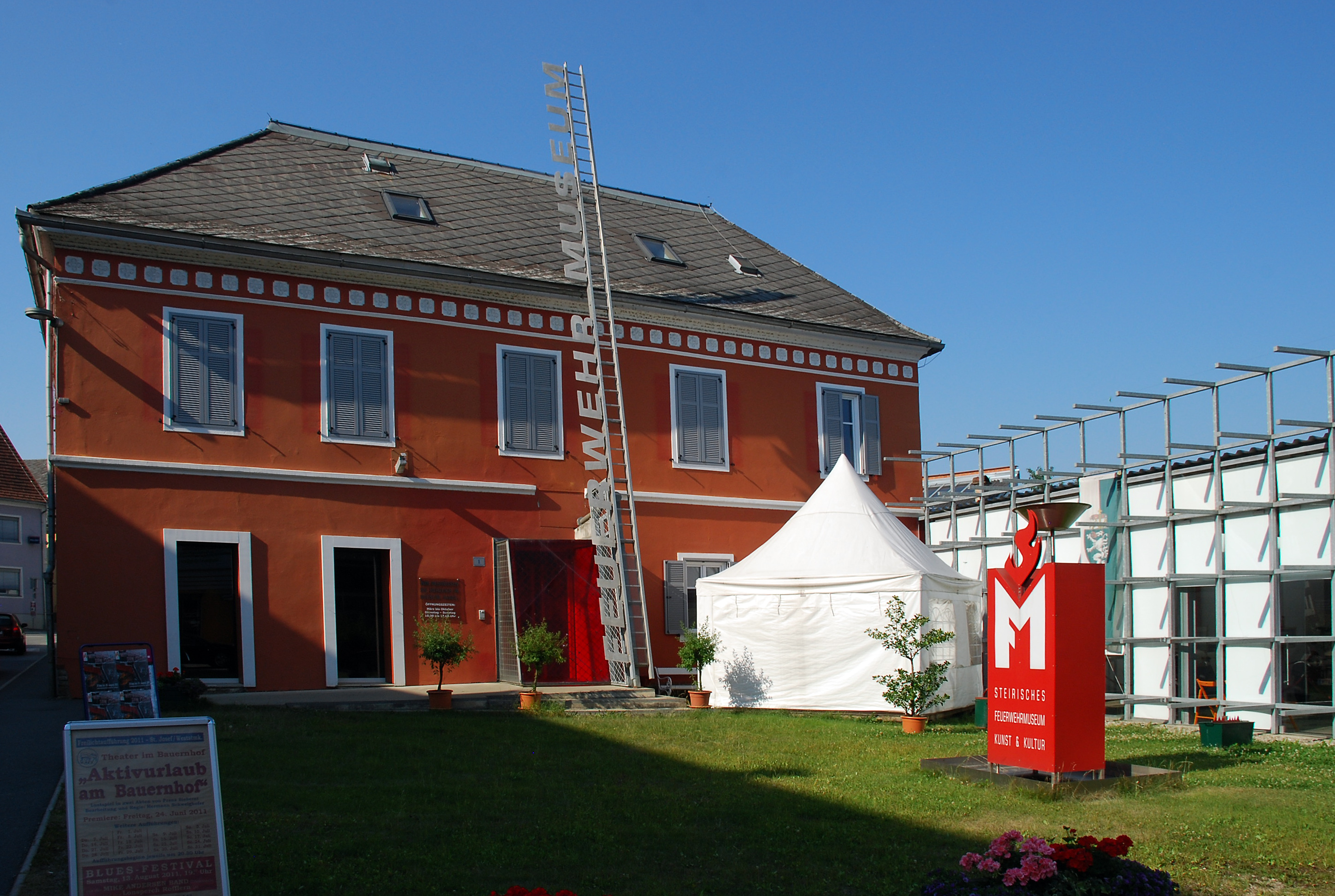 Groß Sankt Florian, Steiermark, Österreich: Hof an der Straße des Feuerwehrmuseums